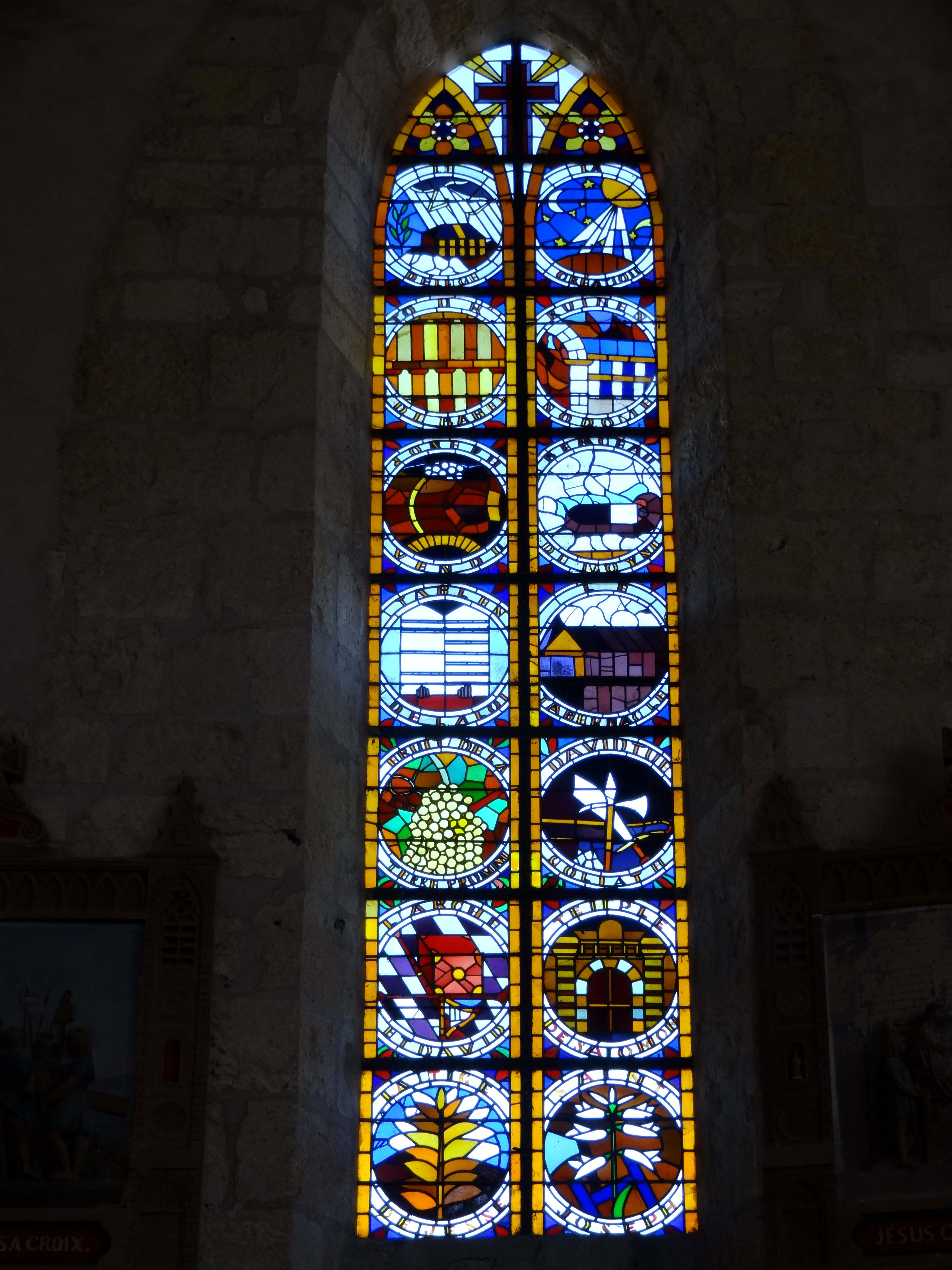 Vitraux de l'abbé Deligny - voir titre.